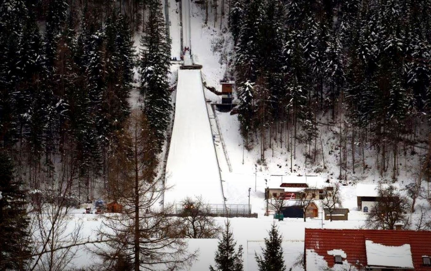 Ljubno ob Savinji - Ski Jump